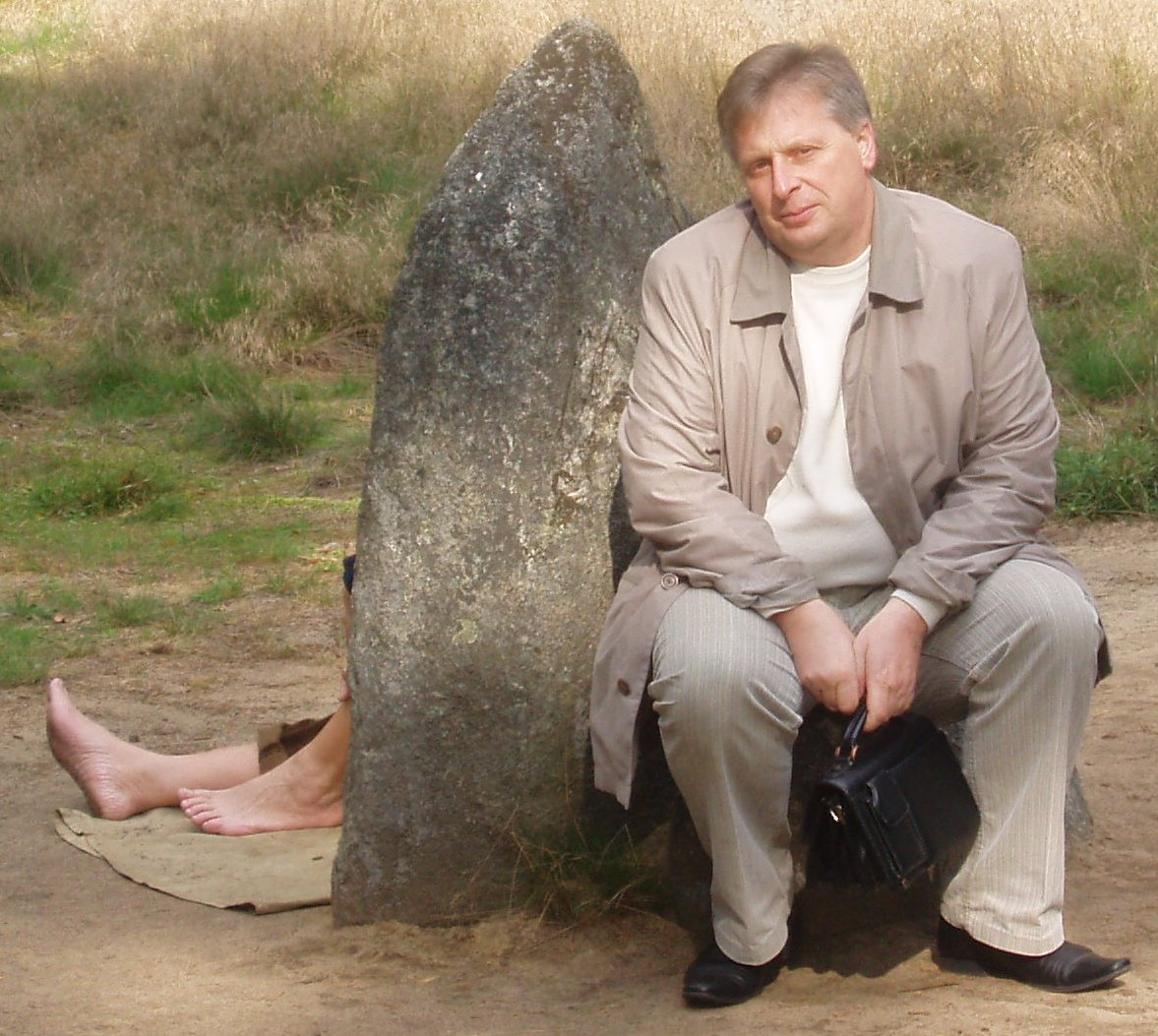 Петро Михайлович Кралюк — український філософ, письменник, публіцист. Доктор філософії, заслужений діяч науки і техніки України, професор Національного університету «Острозька академія».